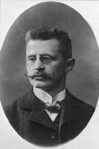 Emanuel Chalupný (1879 - 1958), Český pedagog, právník, sociolog a spisovatel.